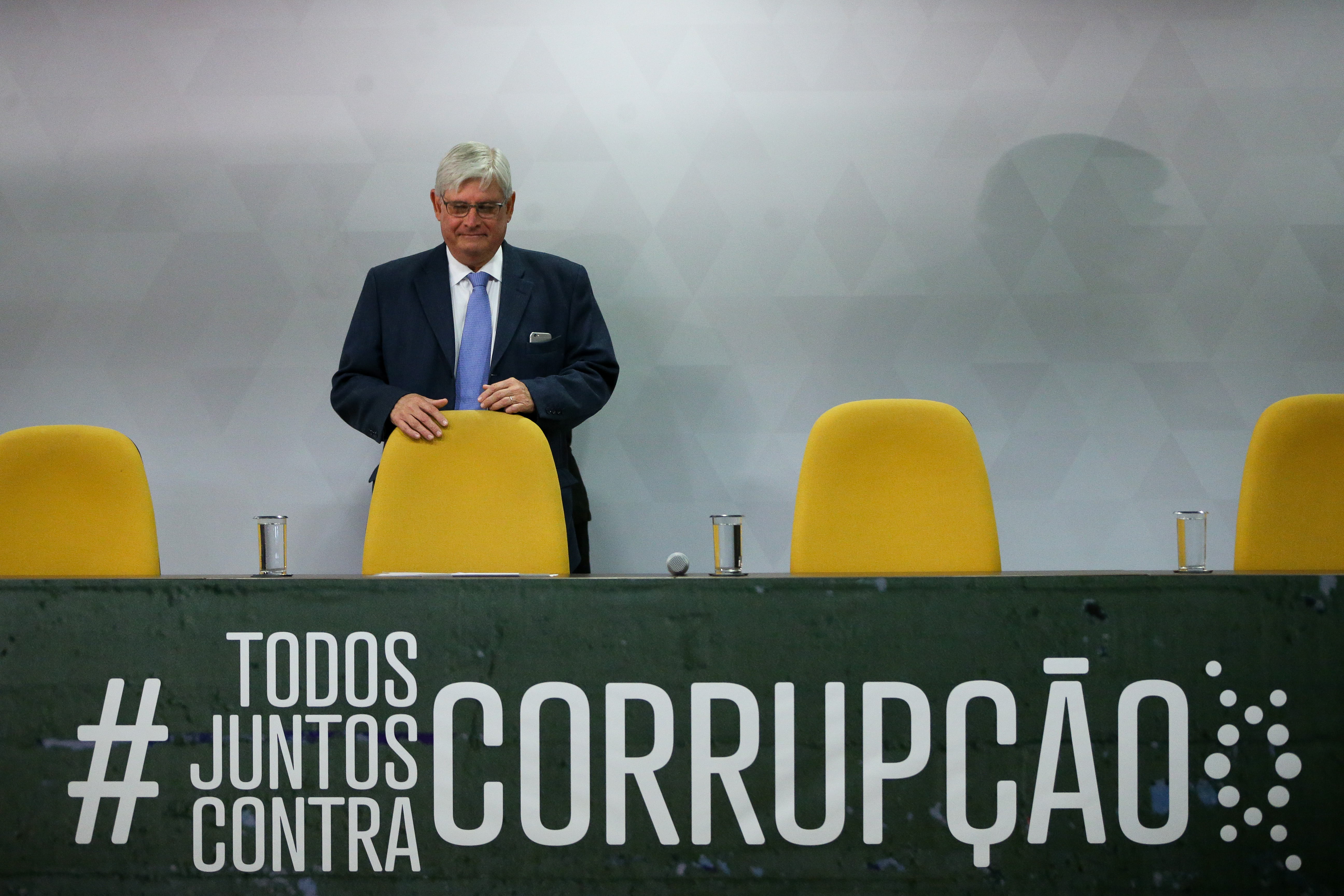 Brasília - O procurador-geral da República, Rodrigo Janot, durante lançamento da campanha Todos juntos contra a corrupção, no Conselho Nacional do Ministério Público (Marcelo Camargo/Agência Brasil)